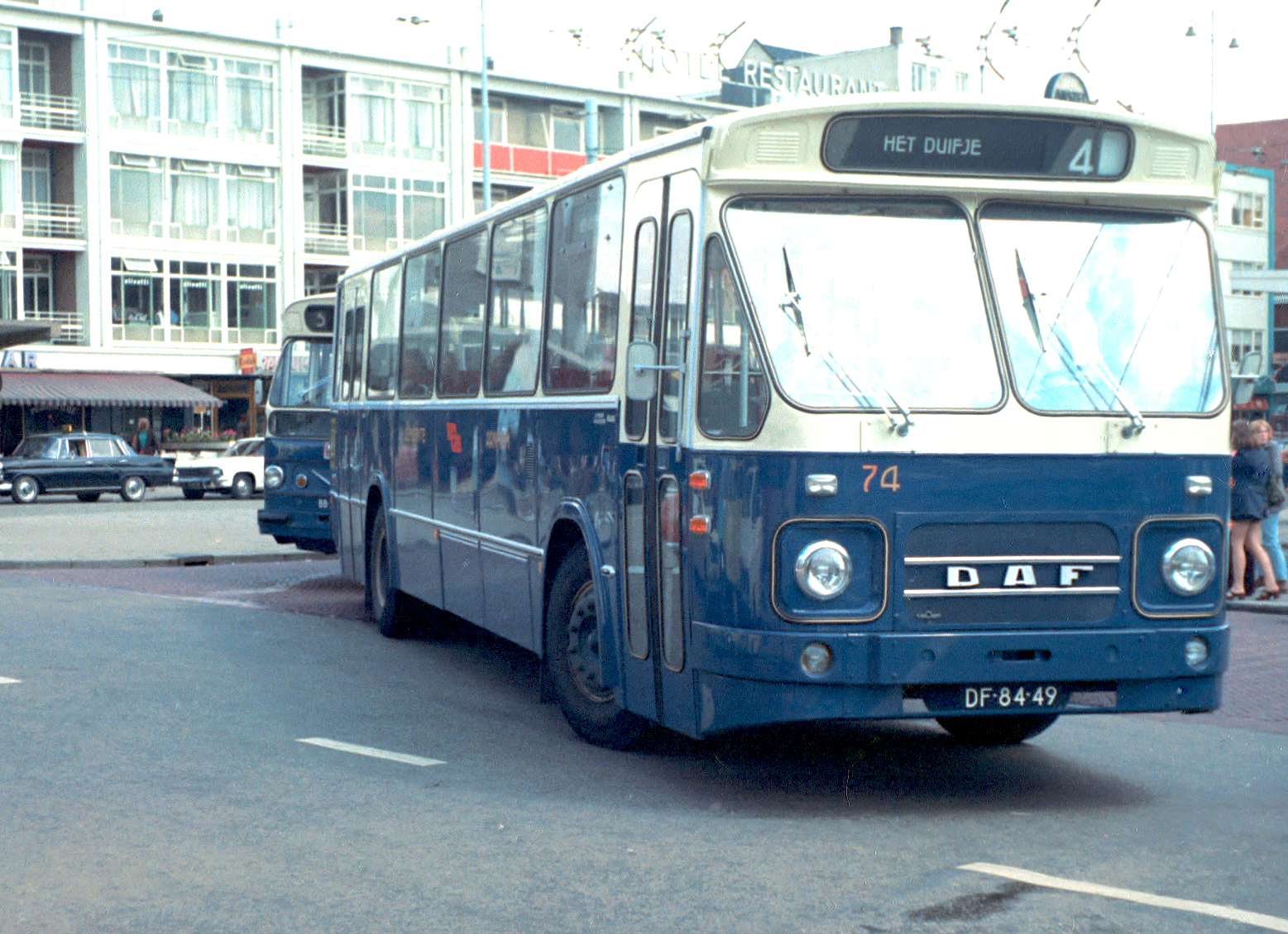 Gemeente Vervoerbedrijf Arnhem bus 74 (ESO nr: 6876) van het type DAF MB200DKDL600 / Den Oudsten te Arnhem.